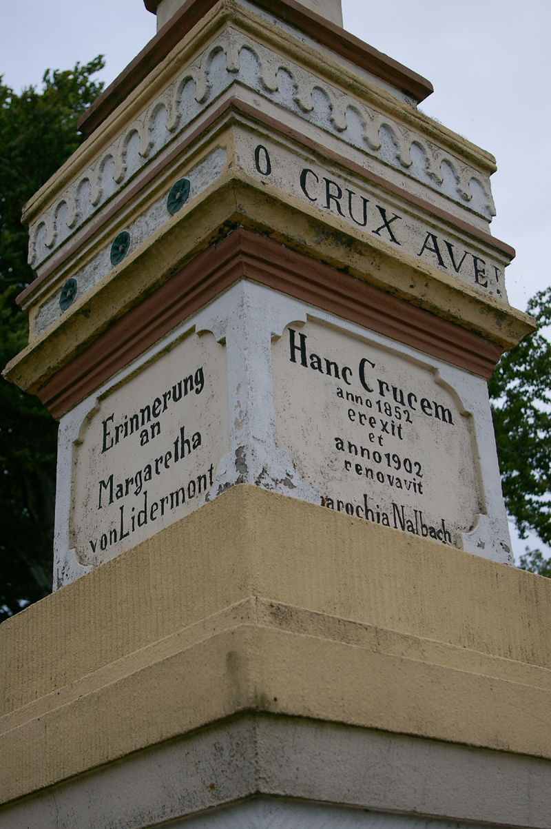 Litermontkreuz